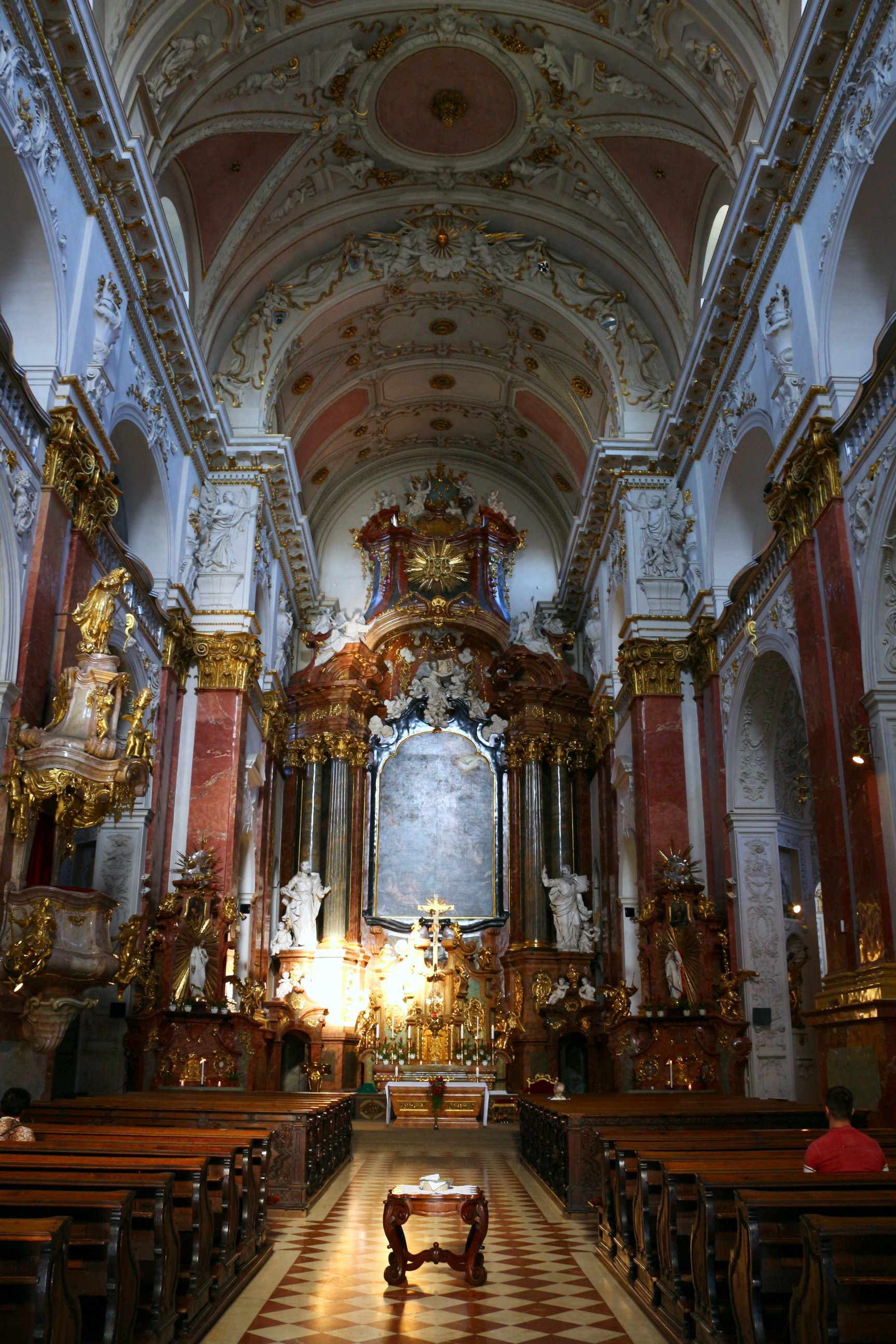 Kostel sv. Ignáce z Loyoly na Karlově náměstí